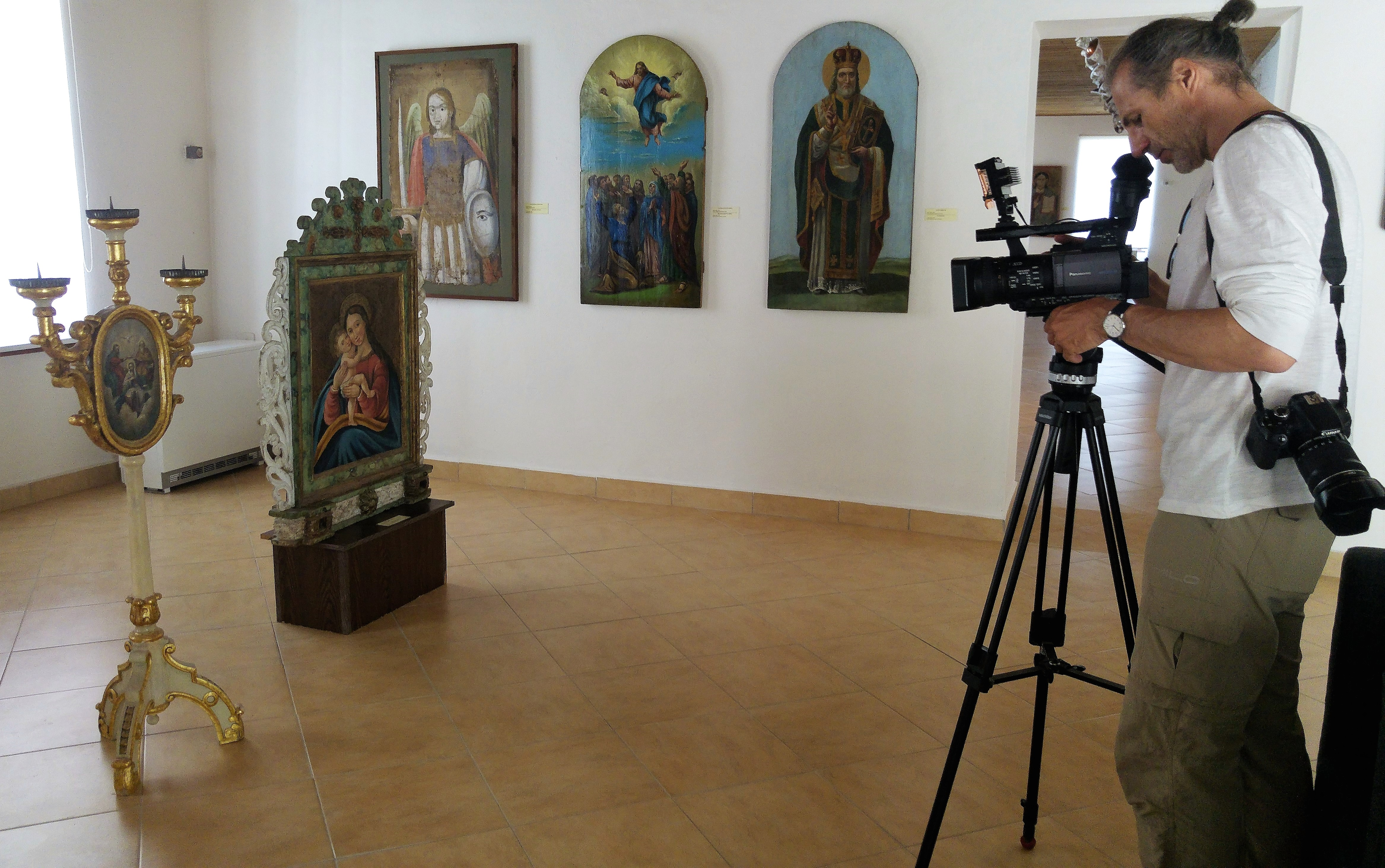 Filmowiec z Państwowego Muzeum Etnograficznego w Warszawie dokumentuje ekspozycję.